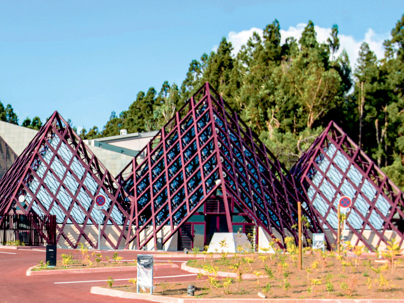 L'entrée de la Cité du Volcan à Bourg-Murat.